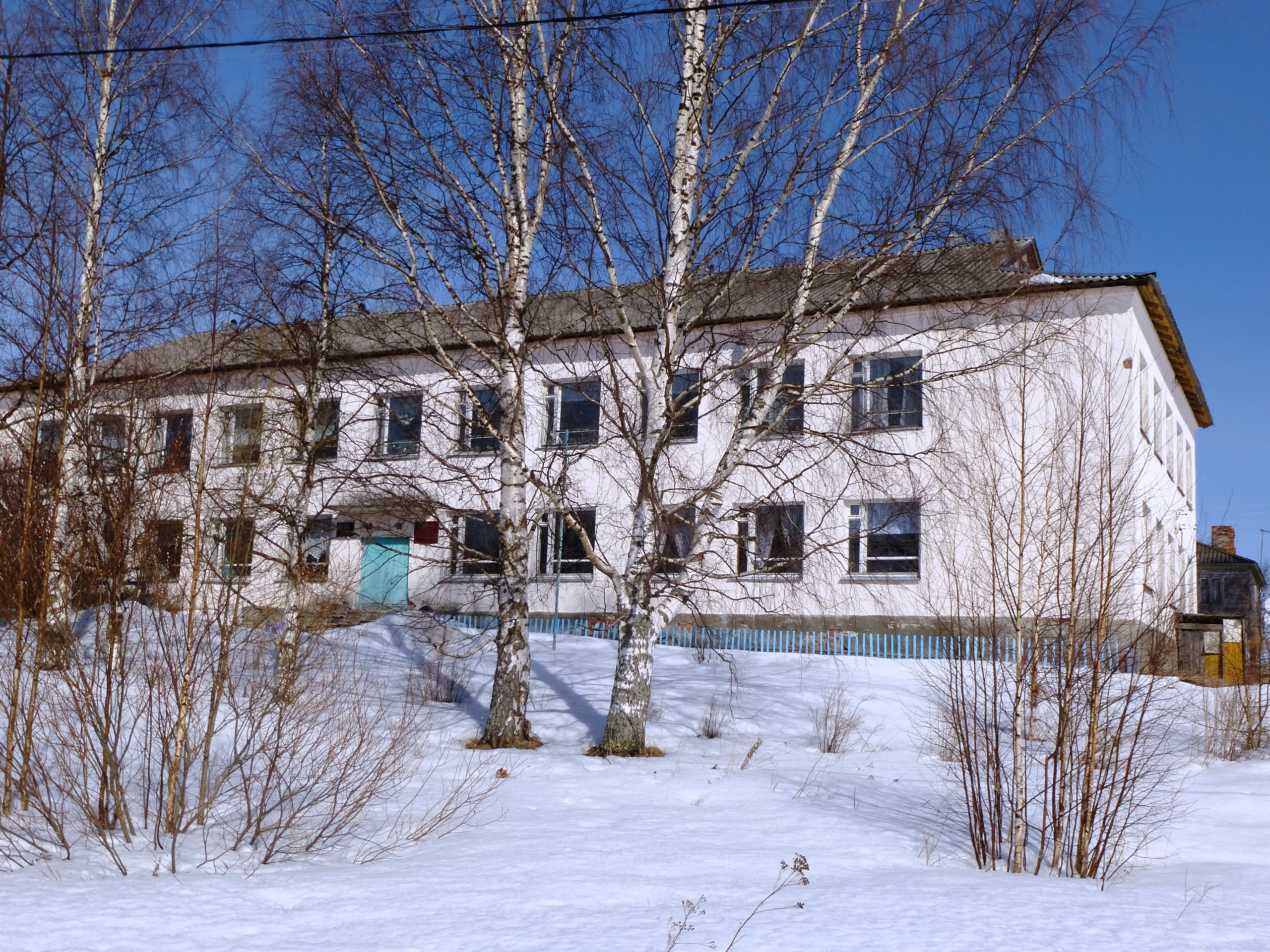 Школа в посёлке Крошнозеро Пряжинского района Республики Карелия.